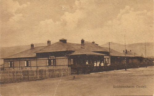 Дедели през Първата световна война.